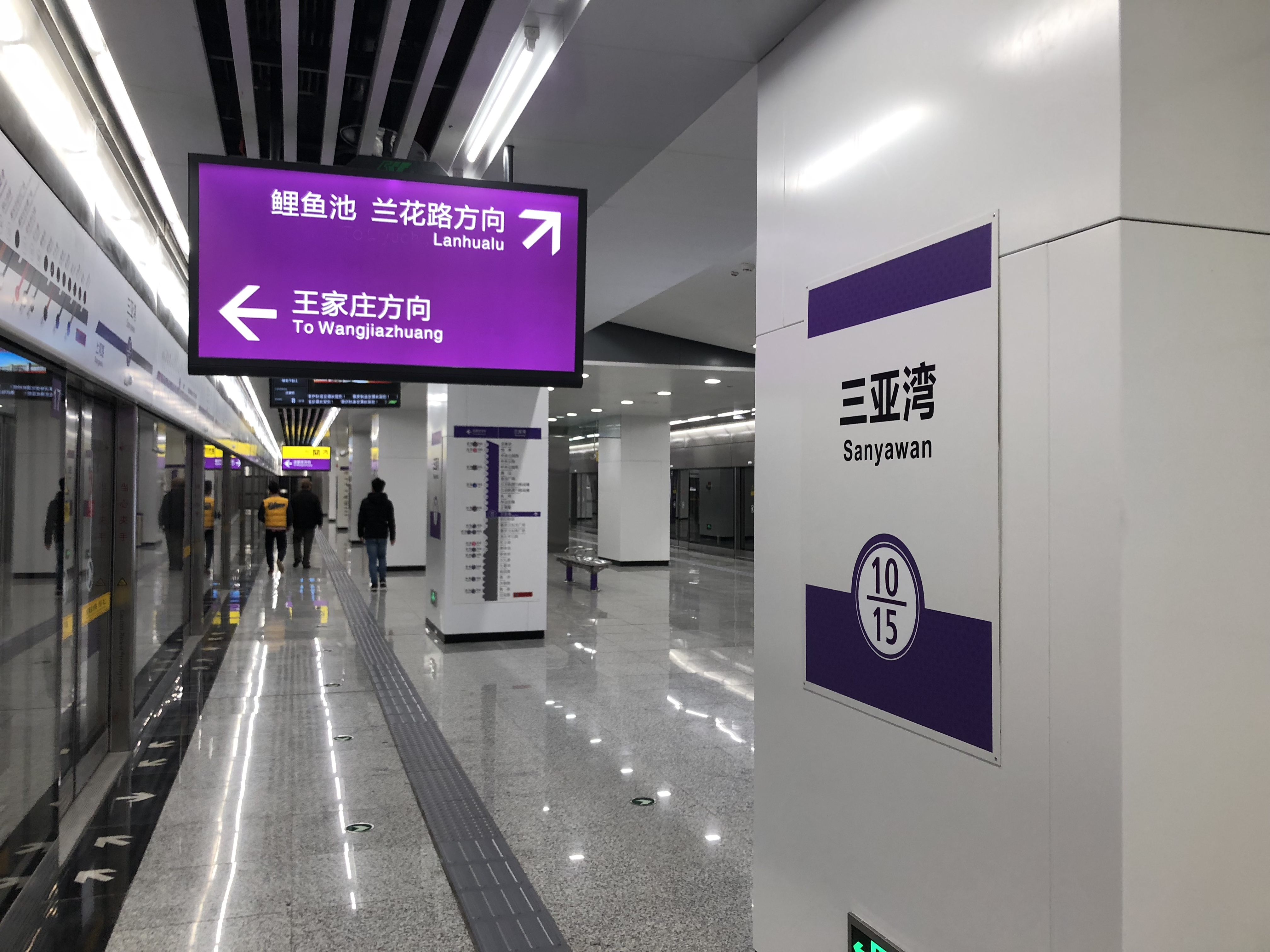 10 号线三亚湾站